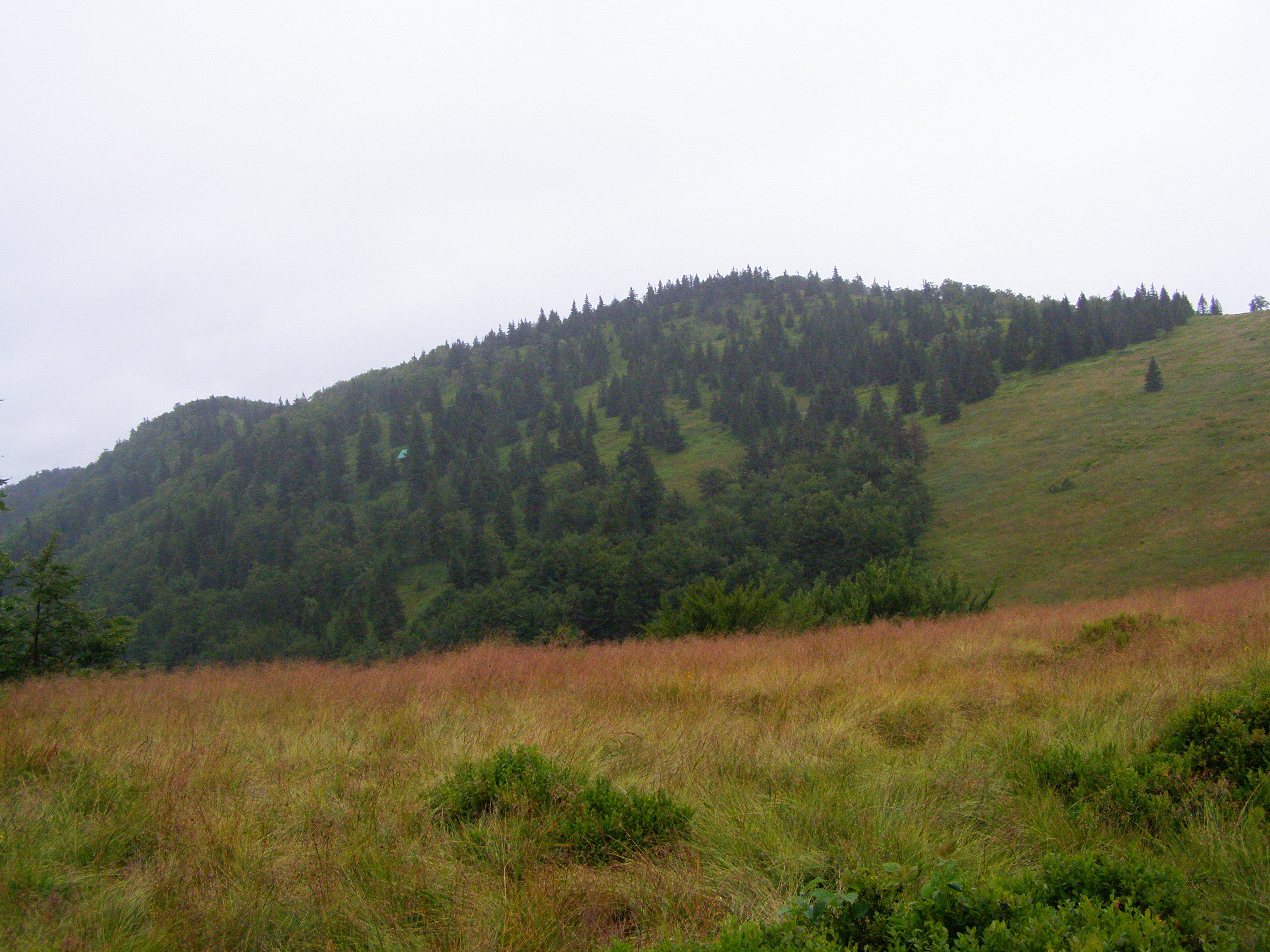 Lúčanská Fatra, severní stráně vrcholu Horná lúka (1299 m)